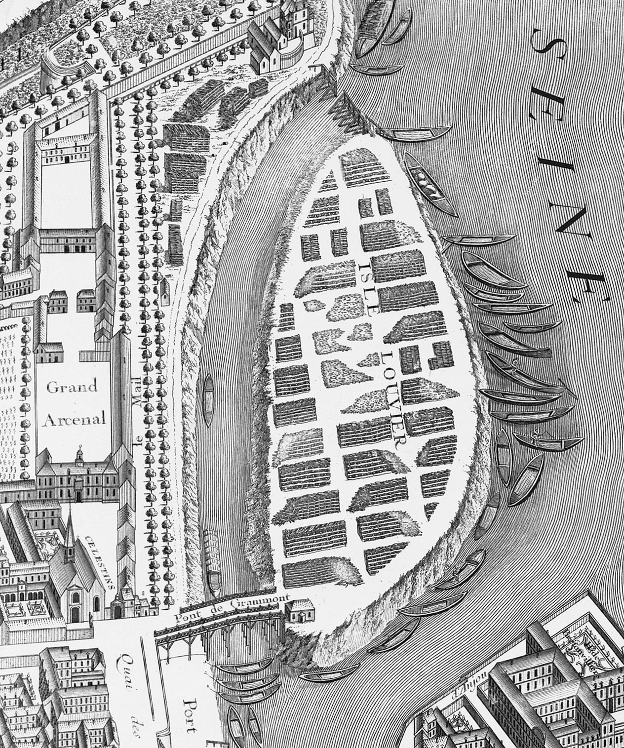 Détail du plan de Turgot de 1734–1736, dans lequel l'on aperçoit l'île Louviers telle qu'elle était à l'époque.